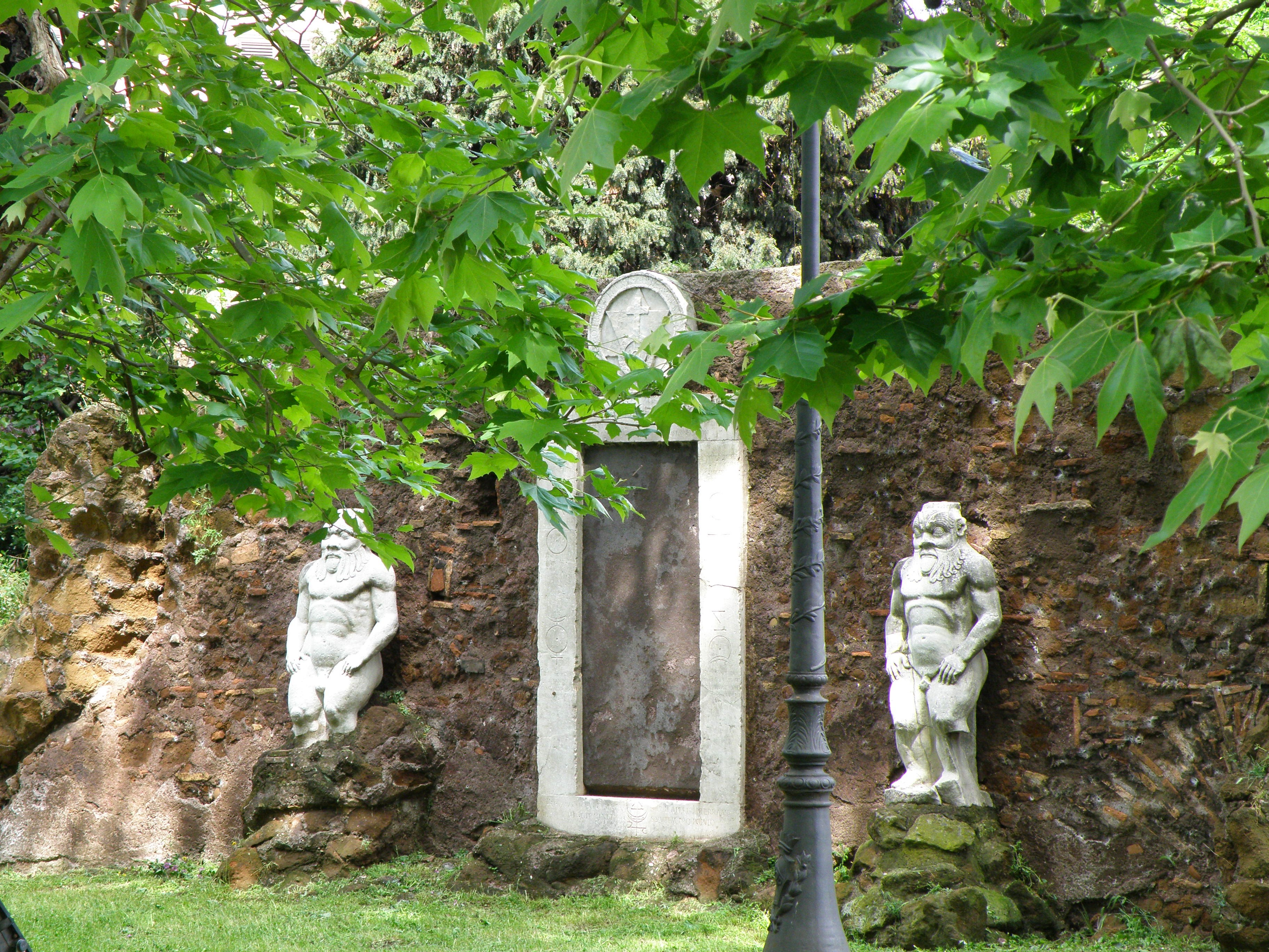 Rione XV Esquilino, Roma, Italy